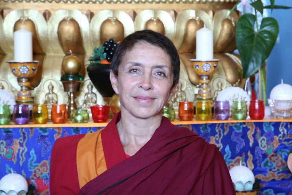 Vénérable Davina Gelek Drölkar